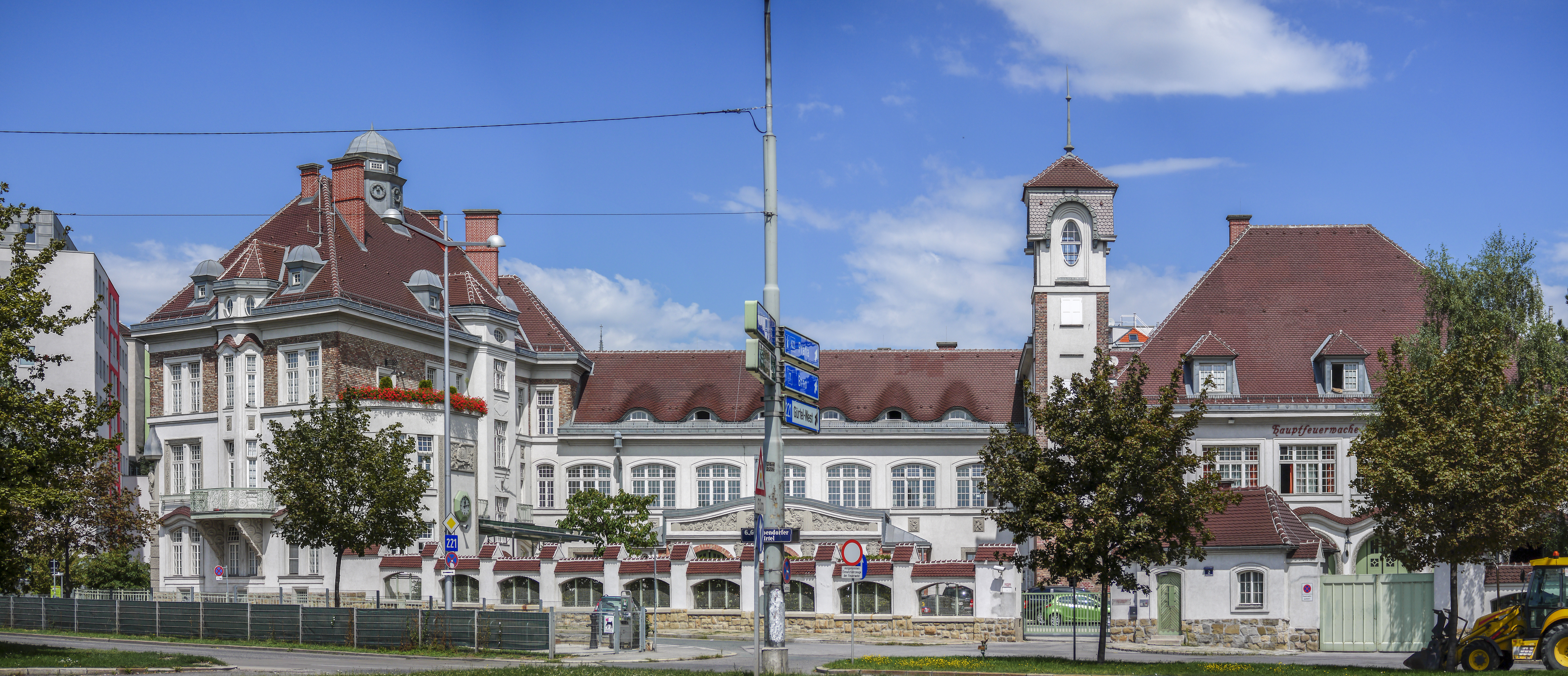 Hauptfeuerwache Mariahilf